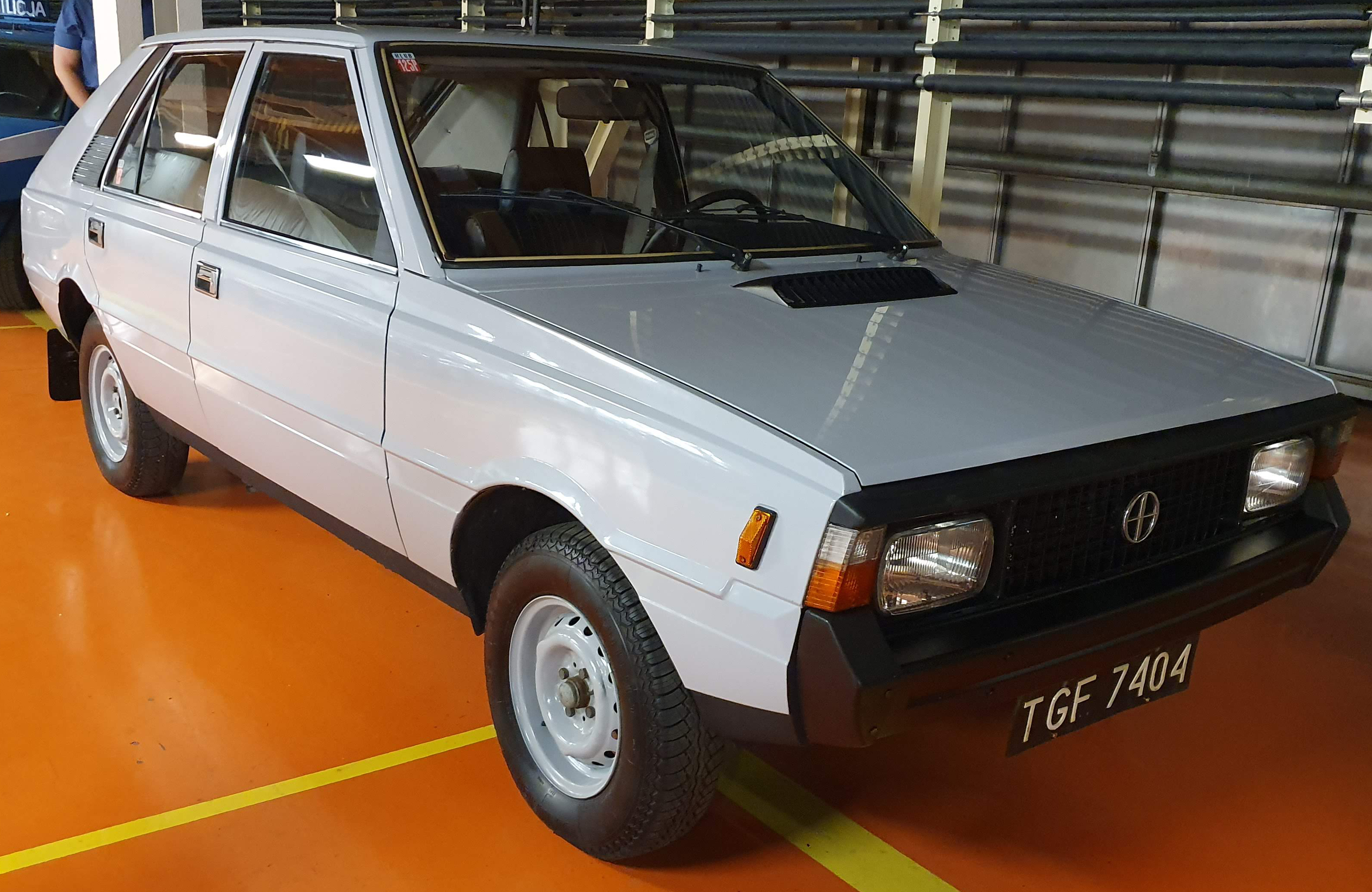 FSO Polonez MR'83 1500 C na wystawie Klasyki w FSO.